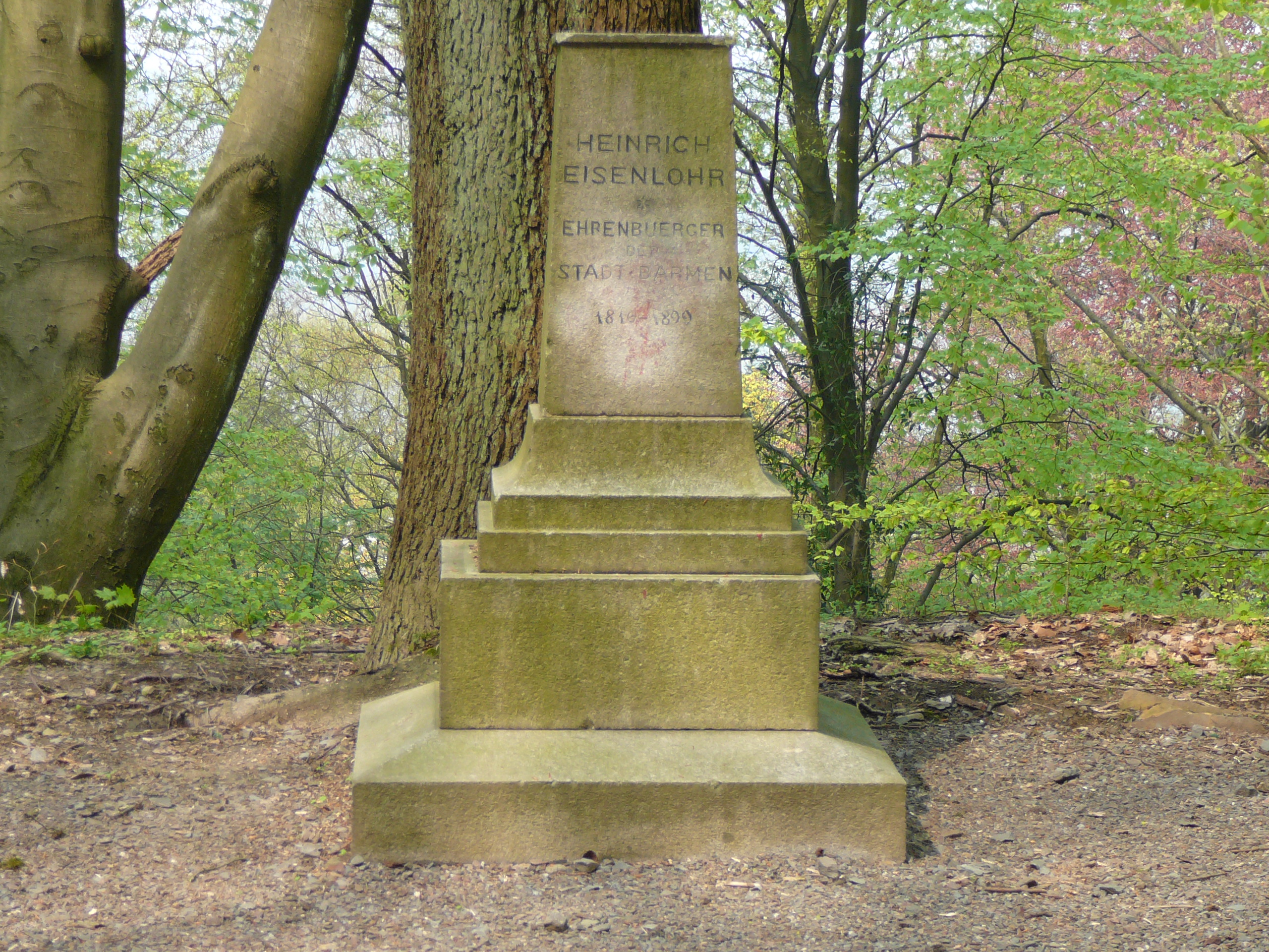 Oberbergische Straße, Wuppertal